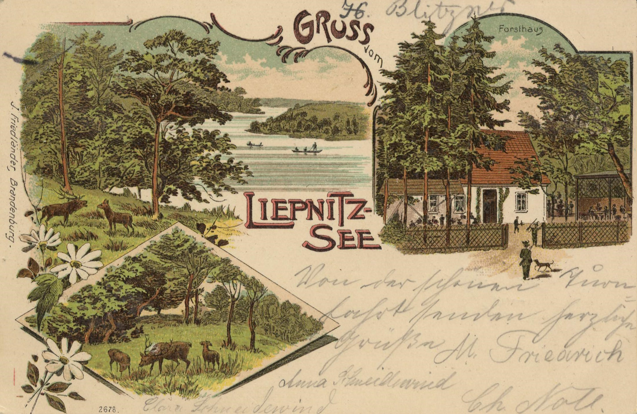 Forsthaus am Liepnitzsee